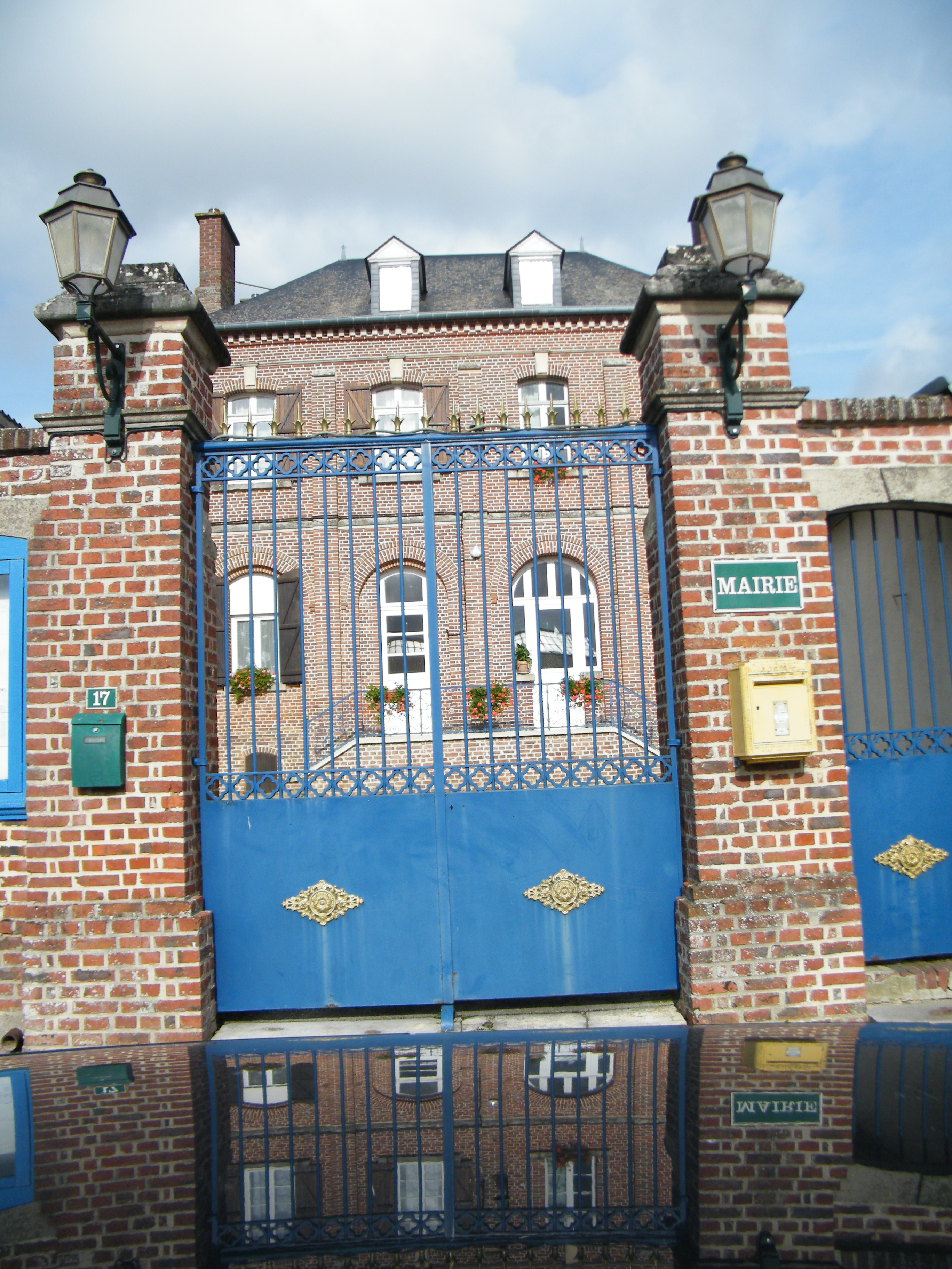 mairie.